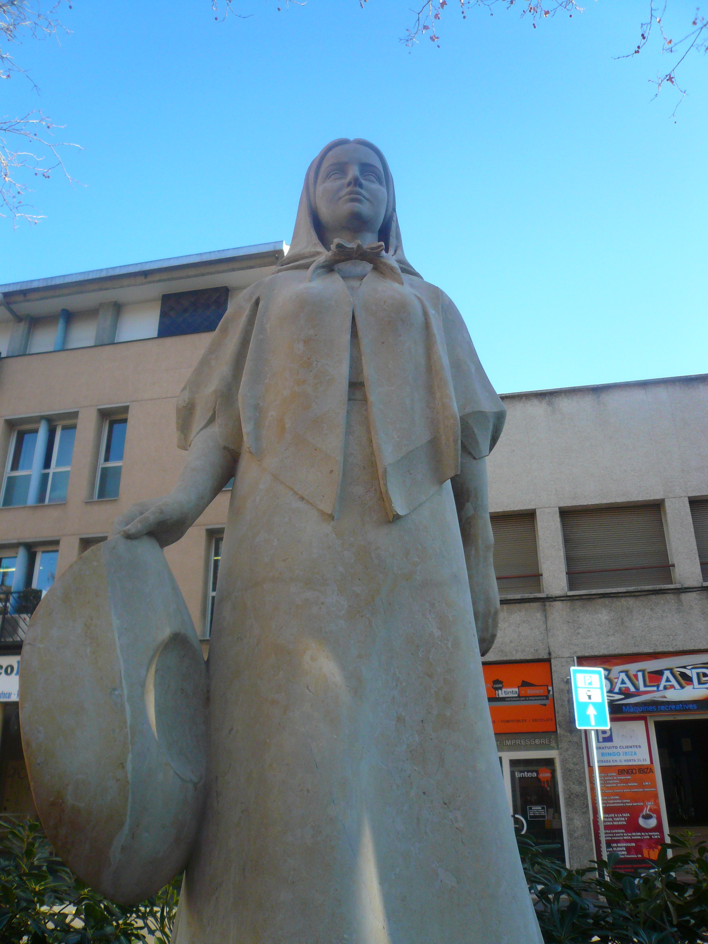 Escultura Eivissenca de Joan Centelles, representant una noia eivissenca amb el vestit tradicional. Es troba a la plaça Eivissa d'Horta des del 1965.